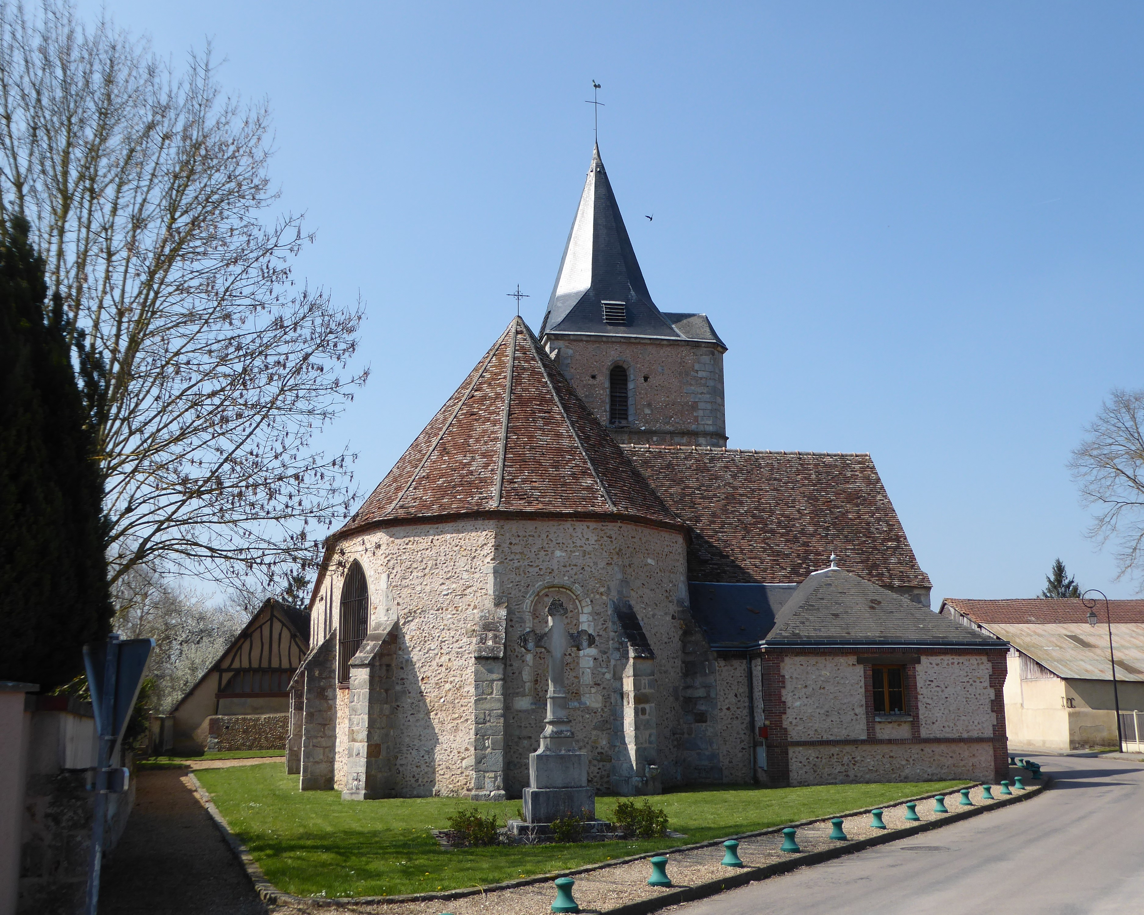 église Saint-Médard, Chaudon, Eure-et-Loir, France.